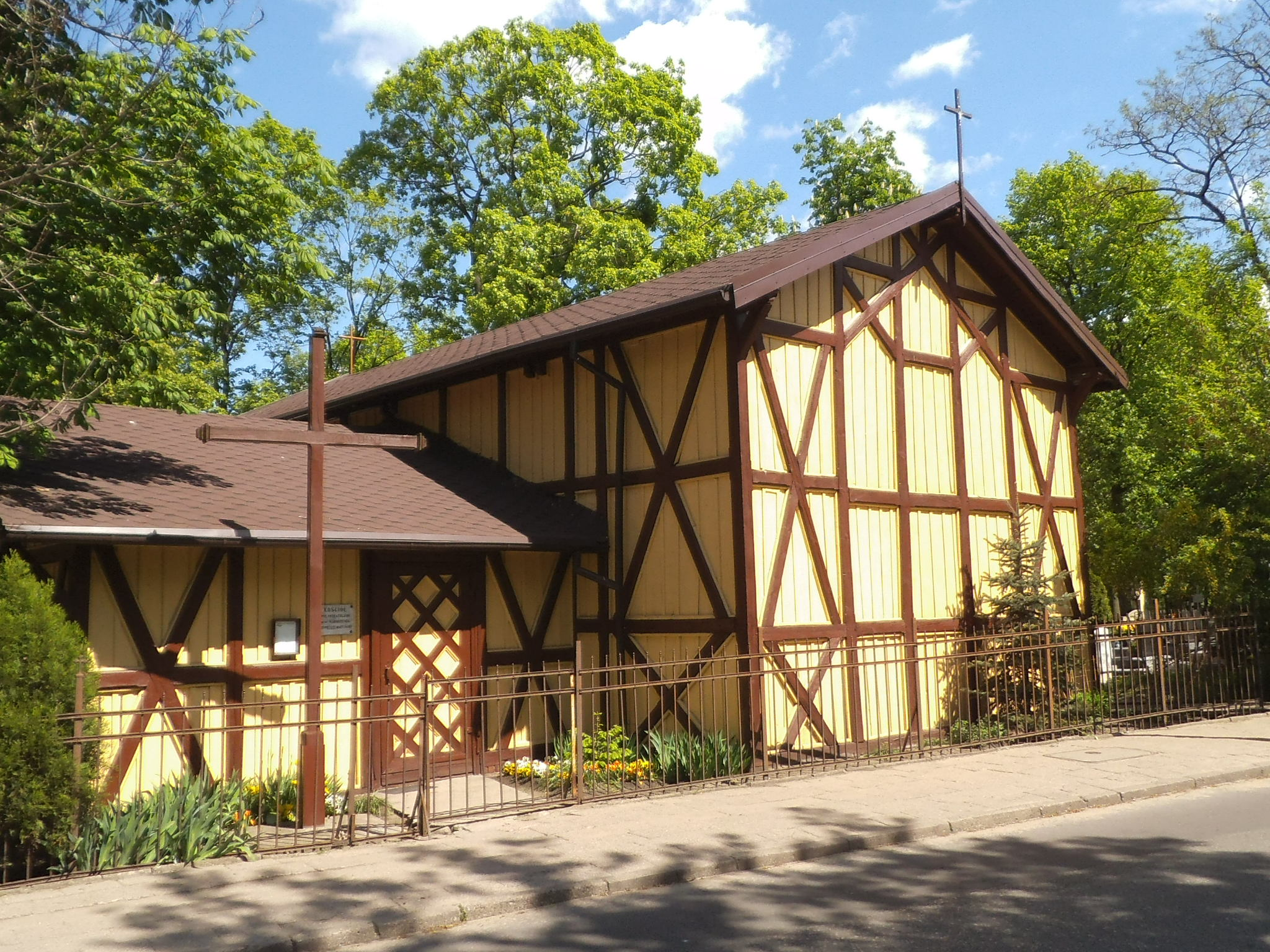 Kaplica polskokatolicka - torun